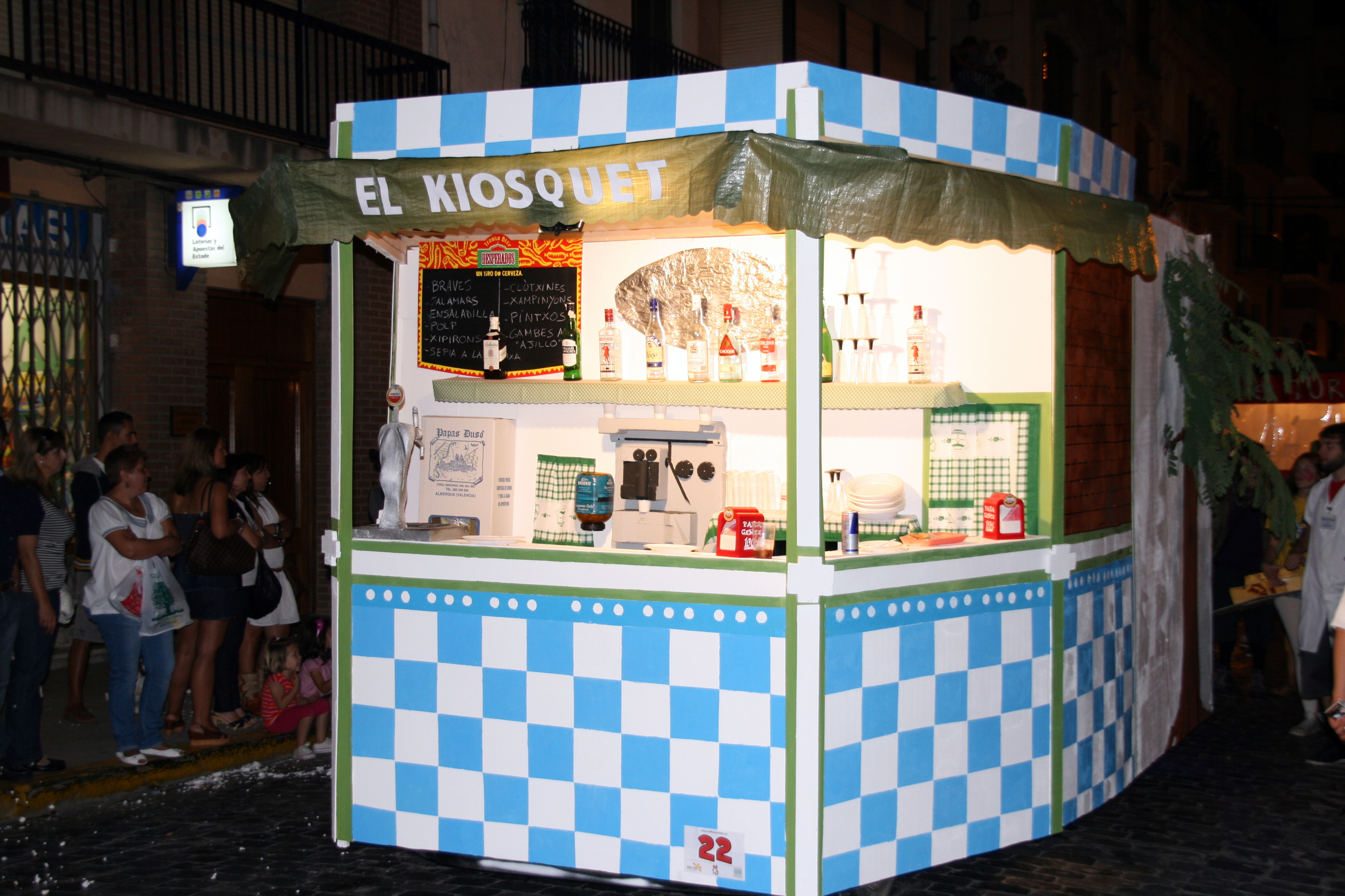 Cotxe en la desfilada del ral·li humorístic representant un dels bars icònics del poble de Carcaixent.